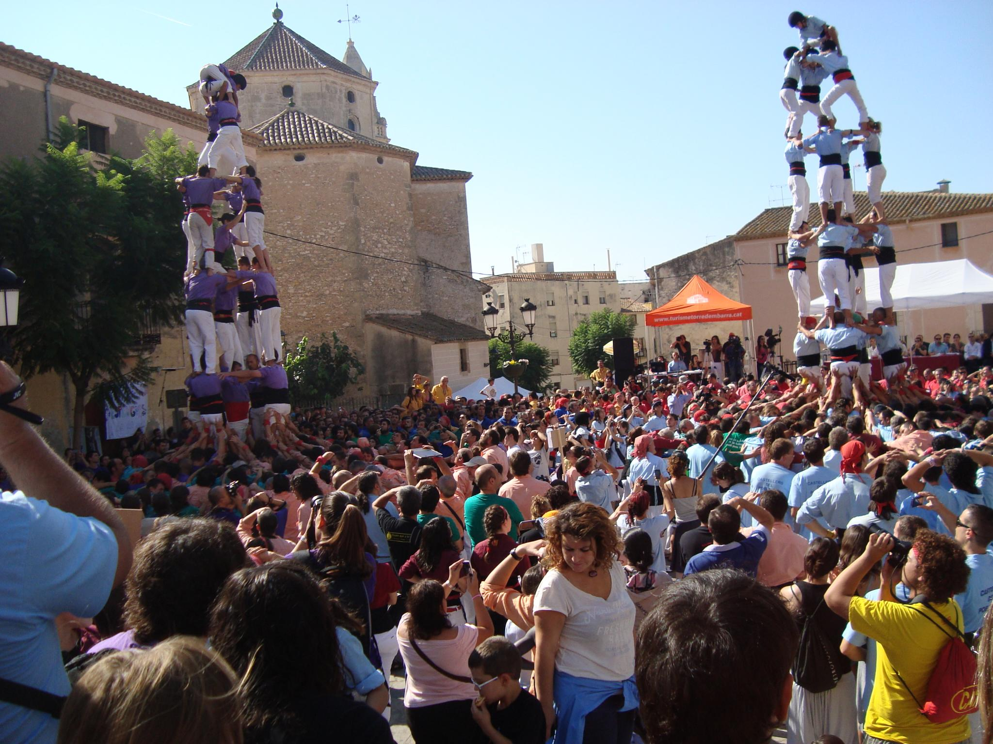 Dos castells al Concur7 2011, amb l'església de Sant Pere, de Torredembarra, al fons. A l'esquerra un 4de7a dels Castellers d'Altafulla. A la dreta potser son els Nois de la Torre fent també un 4de7a